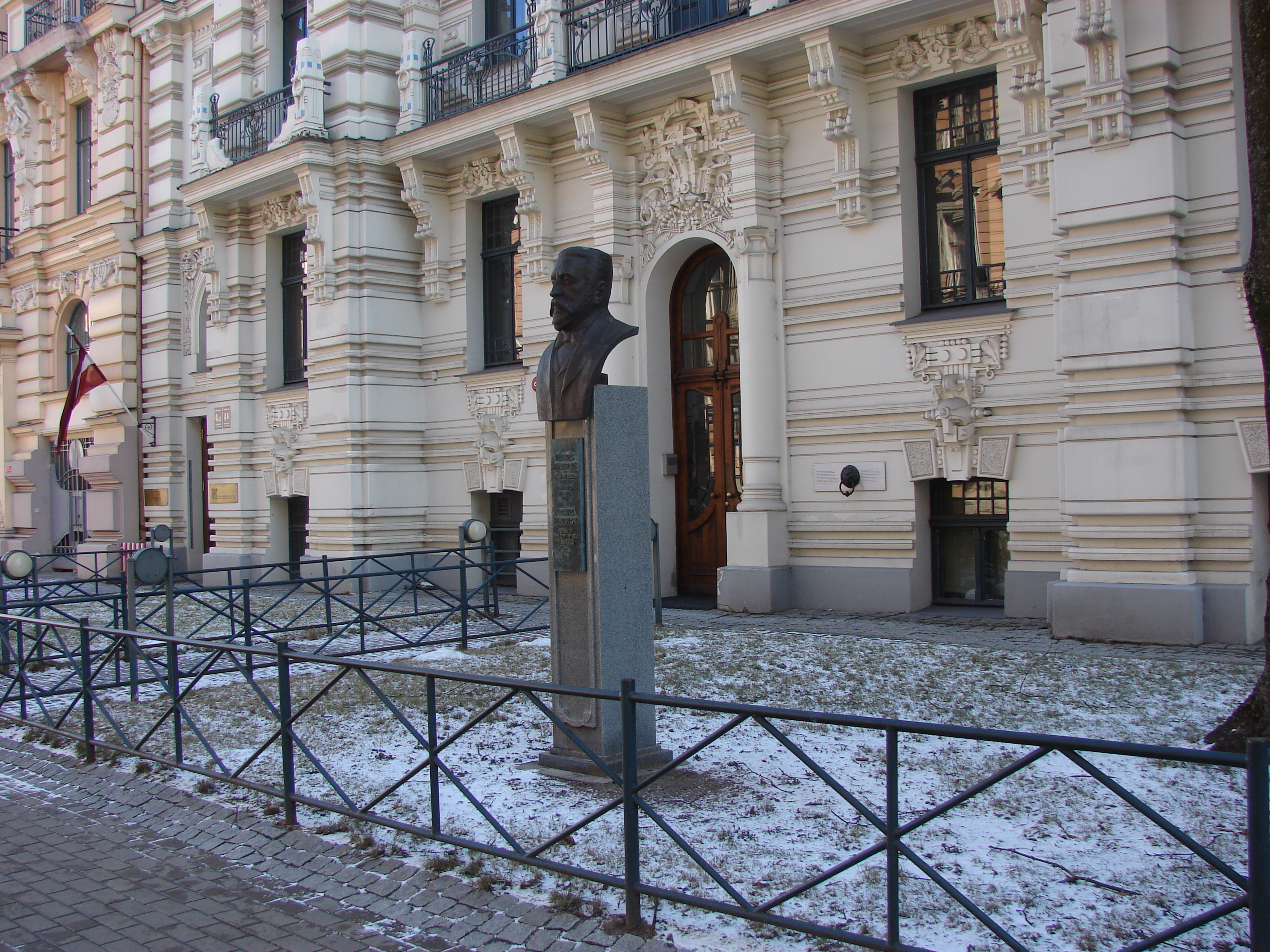 Džordžs Armitsteds 1847-1912, Strēlnieku iela, Rīga, Latvia